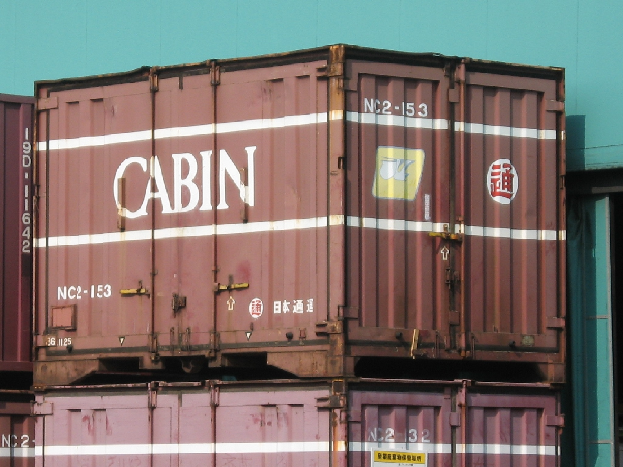 撮影地＝【東京／隅田川貨物駅】